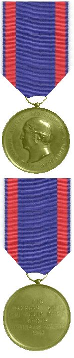 Herinneringsmedaille in goud 1853